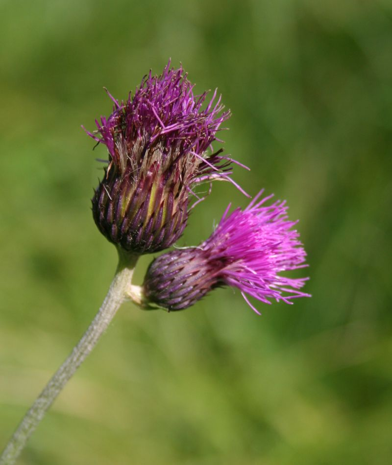 Bach-Kratzdistel (Cirsium rivulare), Korbblütler (Asteraceae) - Österreich/Austria/Autriche: Oberösterreich, Hausruckviertel, Kien NW Attnang-Puchheim